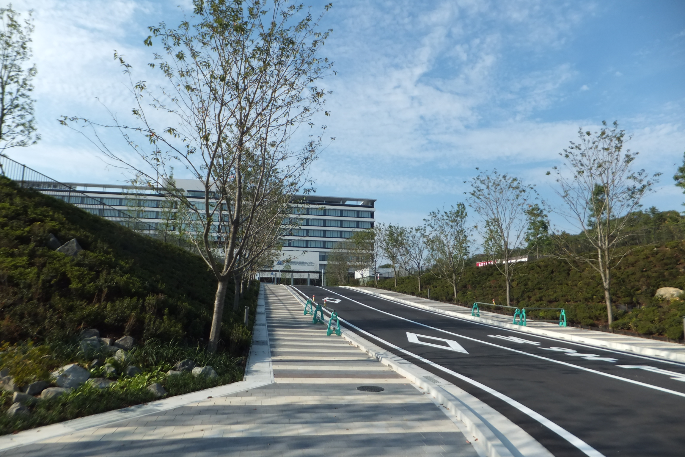 建設中の北播磨総合医療センター（2013年9月22日）